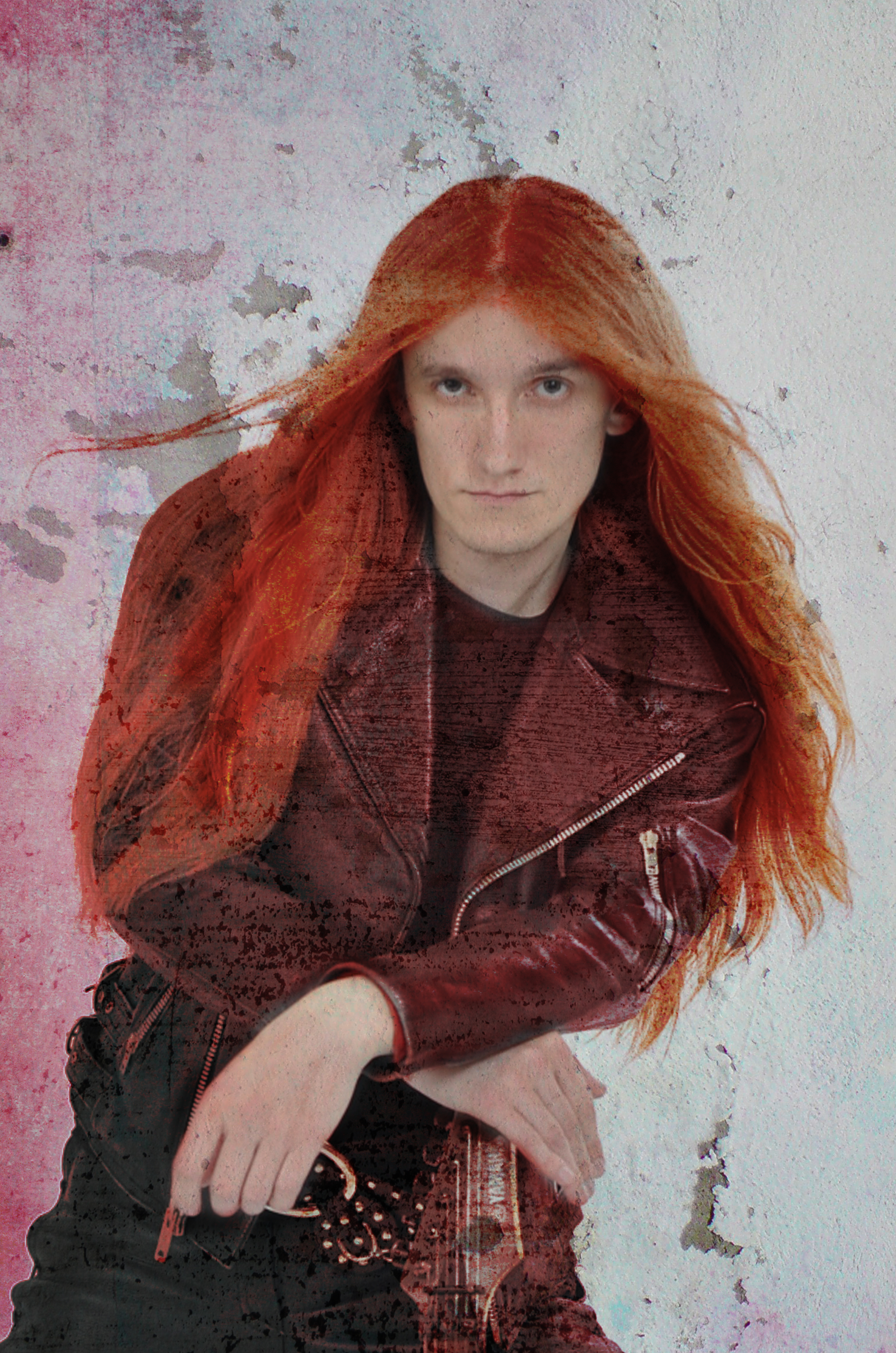 Eter